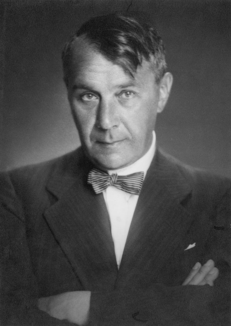 Kosztolányi Dezső portréja